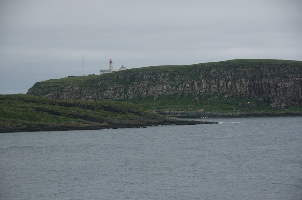 Vardø fyr på Hornøya ved Vardø er Norges østligste fyr.